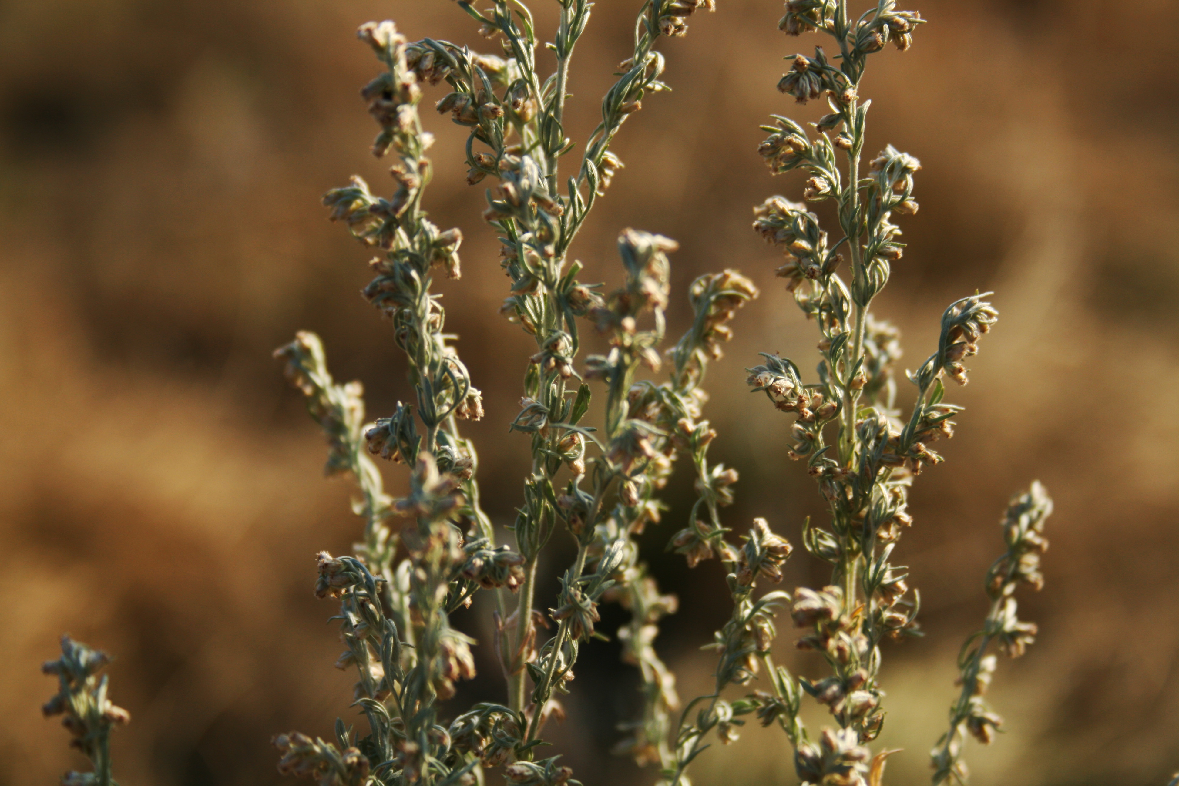 Полынок, или полынь австрийская (Artemisia austriaca). Балка Каменный Лог, Белгородская область.